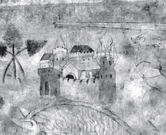 Фрагмент фрэскі «Цуд Св. Георгія» з выявай Верхняга замка і сабора Св. Сафіі ў Полацку. 1580-я